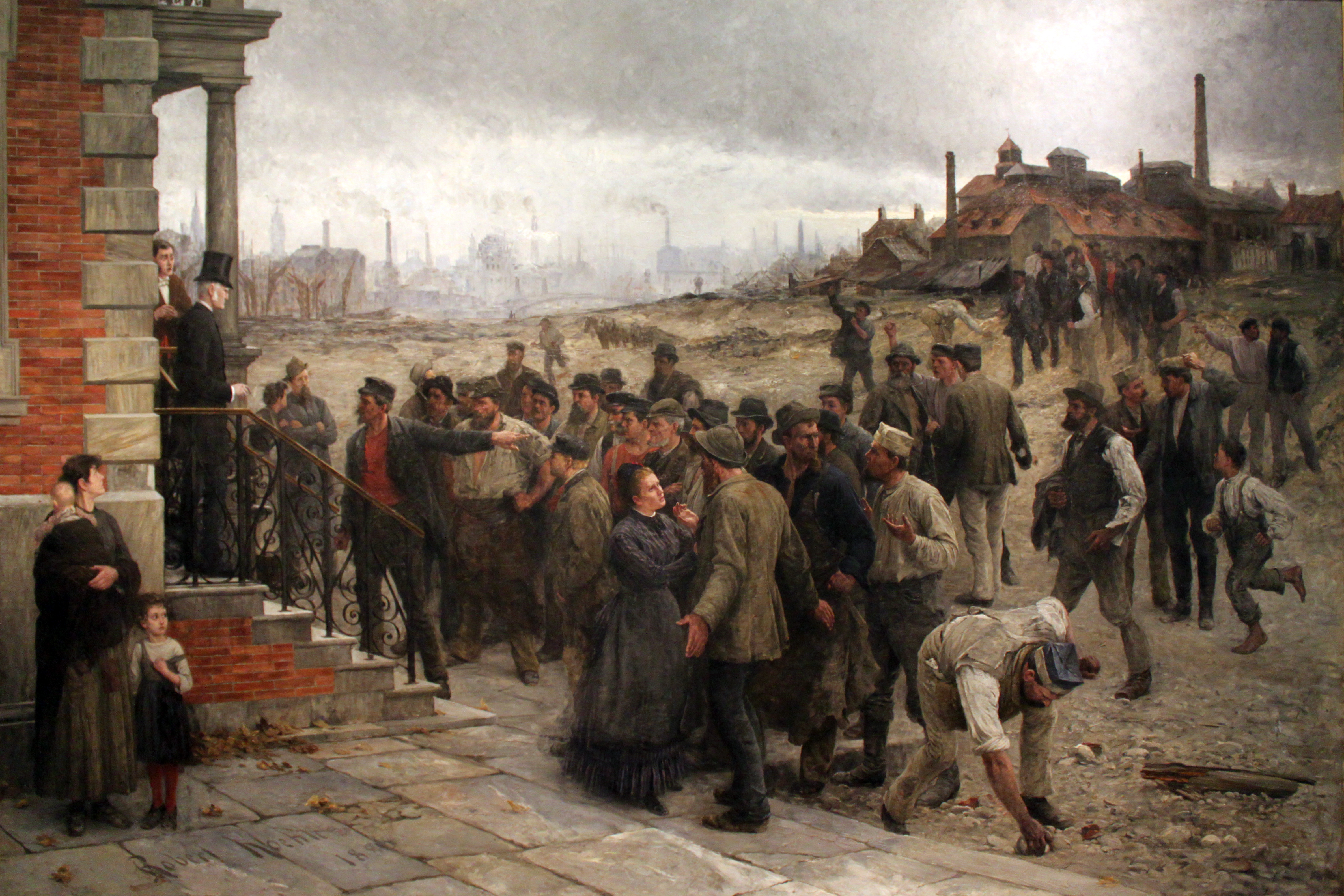 Eine aufgebrachte Menge steht vor einem Fabrikherren. Die spannungsgeladene Situation kann jederzeit in Aggressivität umschlagen. Das Bild avancierte durch Reproduktionen zu einer Ikone der Arbeiterbewegung.